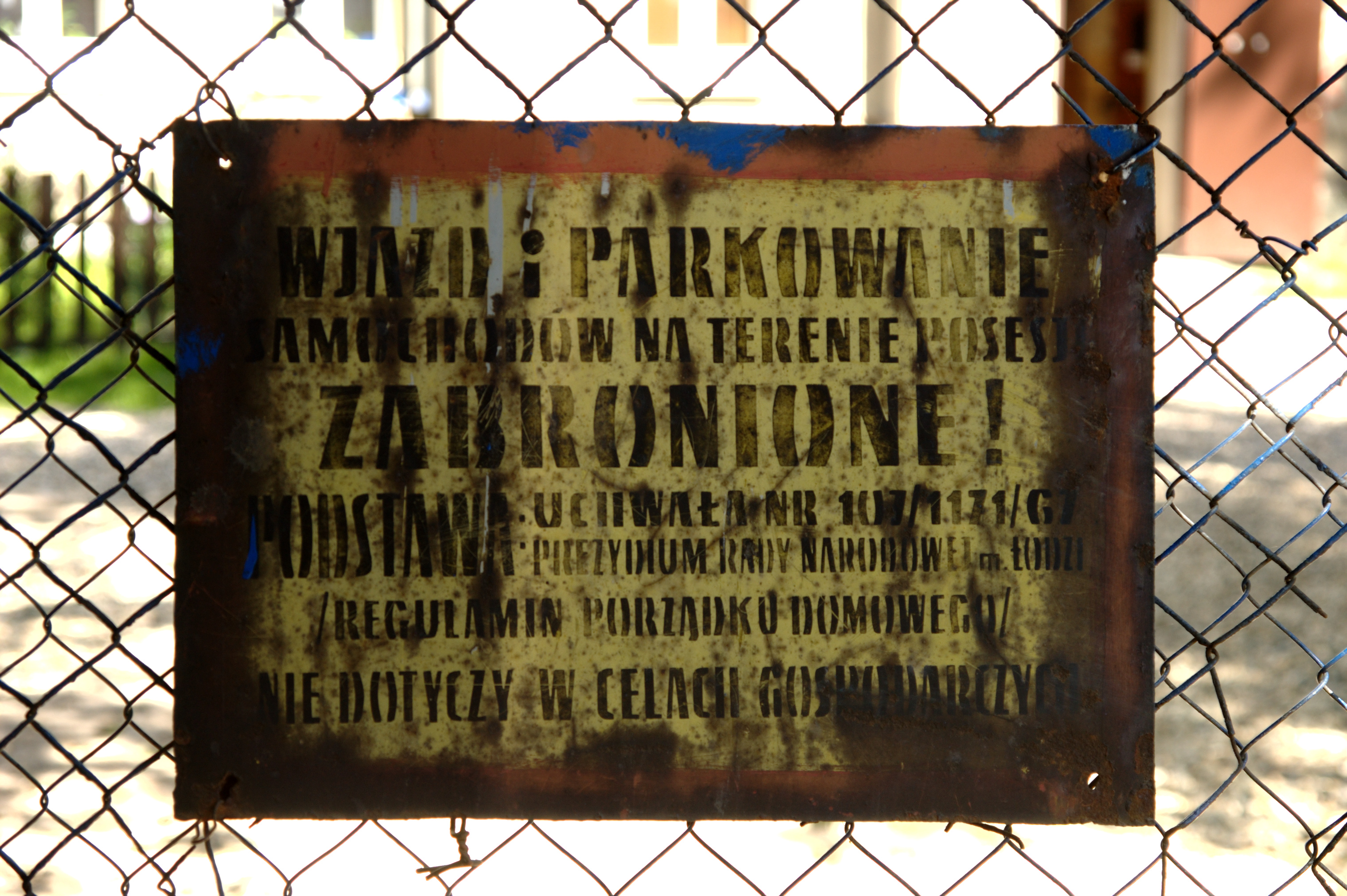 Wjazd i parkowanie samochodów na terenie posesji zabronione! Podstawa: uchwała nr 107/1171/G7 prezydium Rady Narodowej m. Łodzi /regulamin porządku domowego/ Nie dotyczy w celach gospodarczych